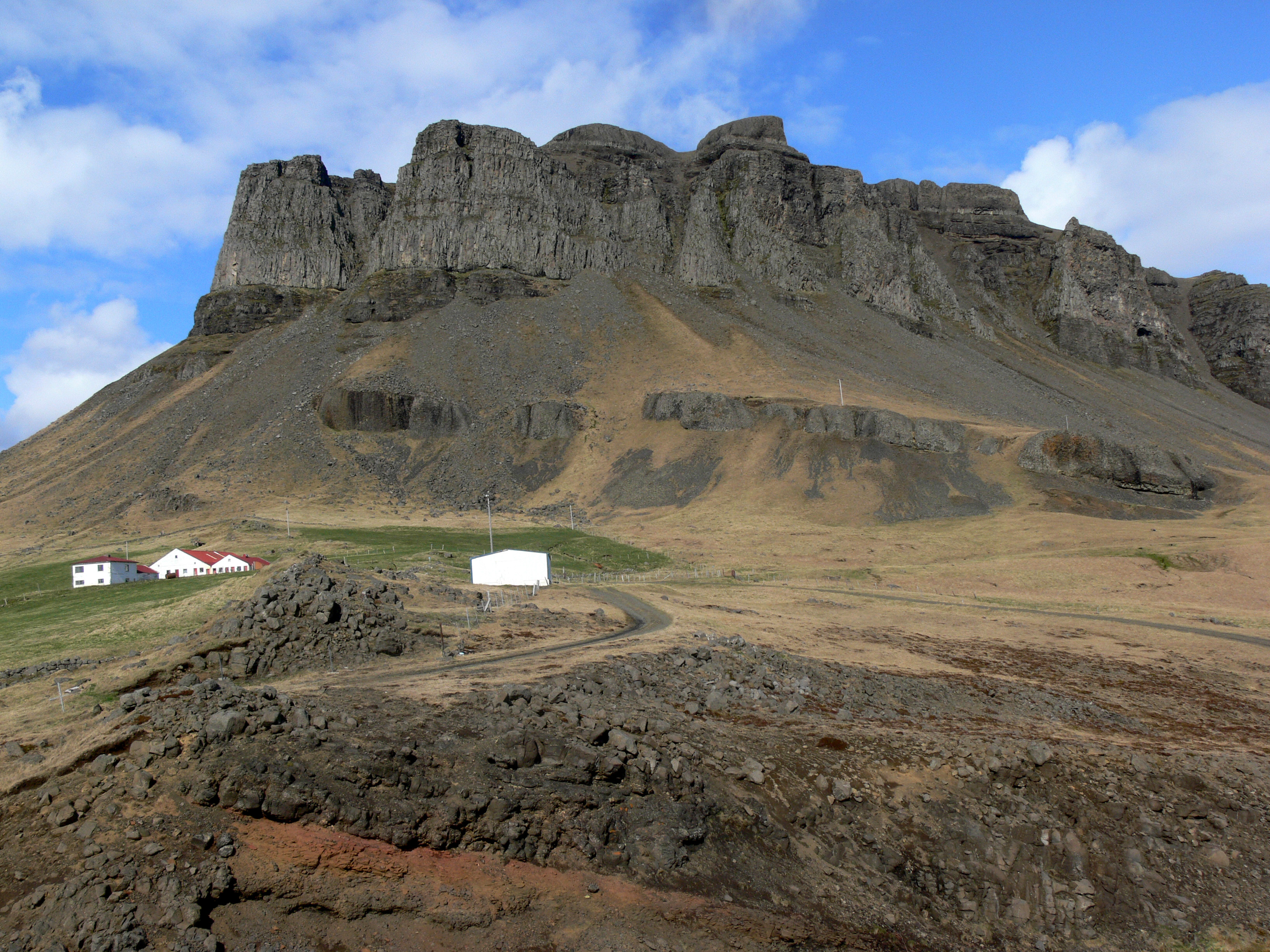 Hof Þyrill unter dem Berg Þyrill. Hier wohnte in alten Zeiten Þorsteinn Gullhnappur, der den Banditen Hörður Grímkelsson auf der Geirshólmur-Insel tötete (Harðar saga og Hólmverja)